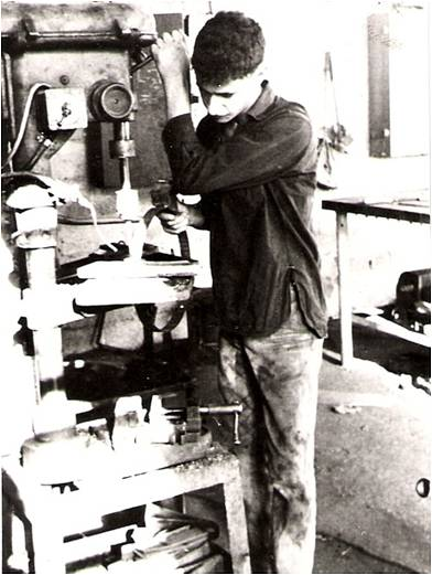 אורי לבוביץ ( 31 בינואר 1946 - 6 ביוני 1967) היה חייל צה"ל שעוטר בעיטור המופת על לחימתו בגבעת התחמושת במלחמת ששת הימים. לבוביץ היה חובש קרבי שעוטר על דבקות במשימה. במשך כל הלחימה, טיפל בפצועים, גם באלה שנפגעו, ושכבו במקומות חשופים והיו תחת ירי של הליגיון הירדני. לבוביץ נהרג בעת שטיפל בשני חיילים פצעים. הוא נקבר בבית הקברות הצבאי בהר הרצל. בתמונה: אורי לבוביץ בתיכון עמל עבודה במסגריה